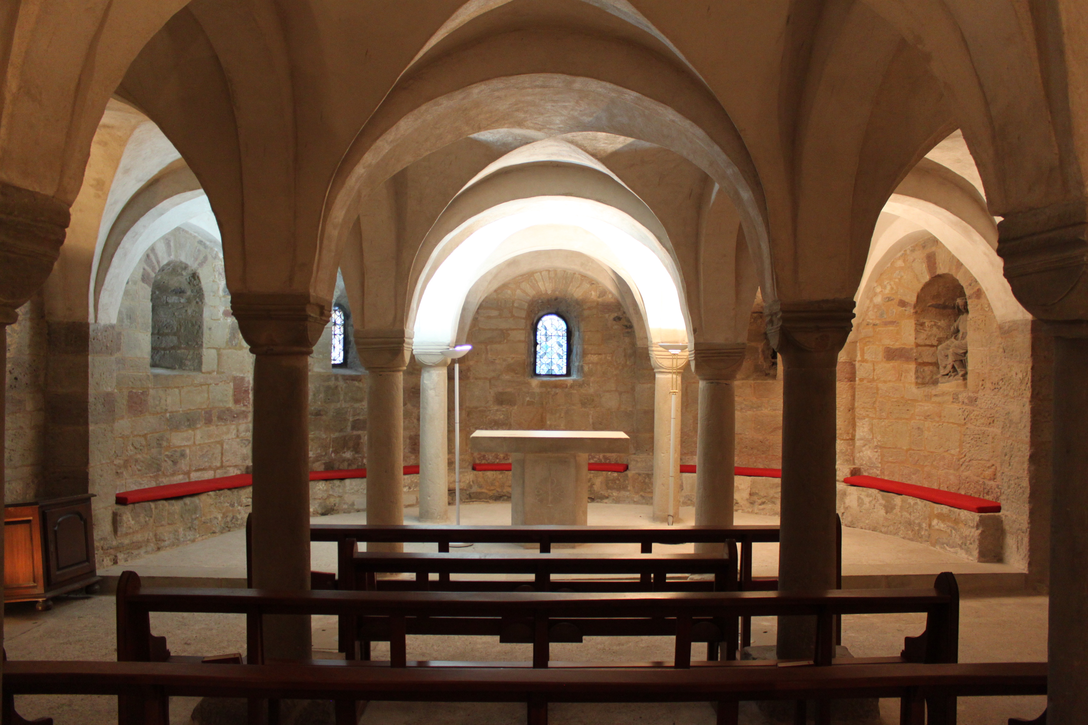 Remiremont, Vosges, Lorraine, France